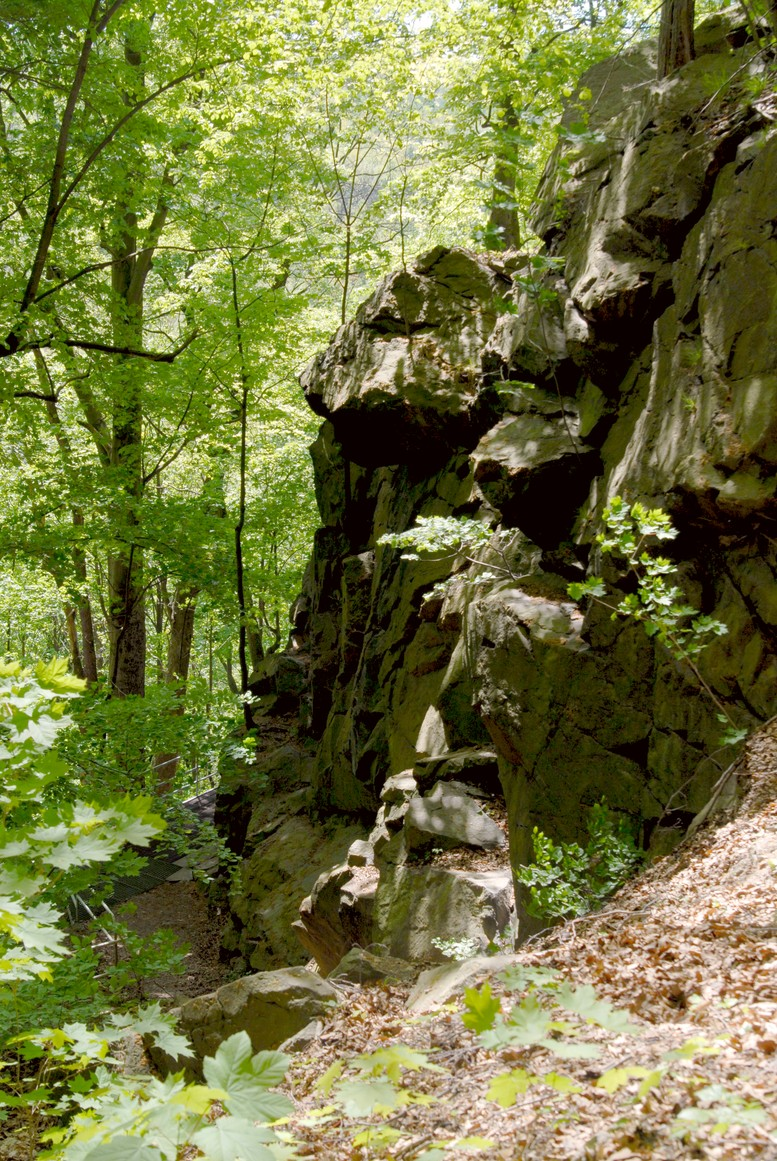 Eingang zur Prinzenhöhle.